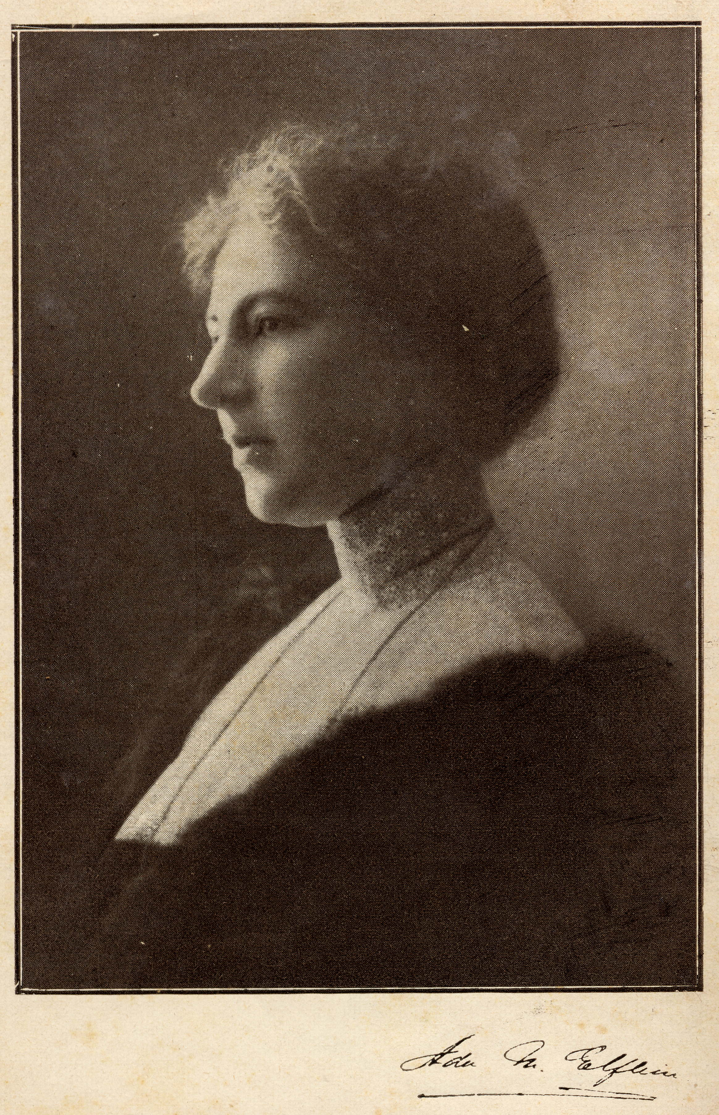 Ada Maria Elflein, Argentine writer